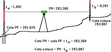 Traslado de una cota de un punto a otro